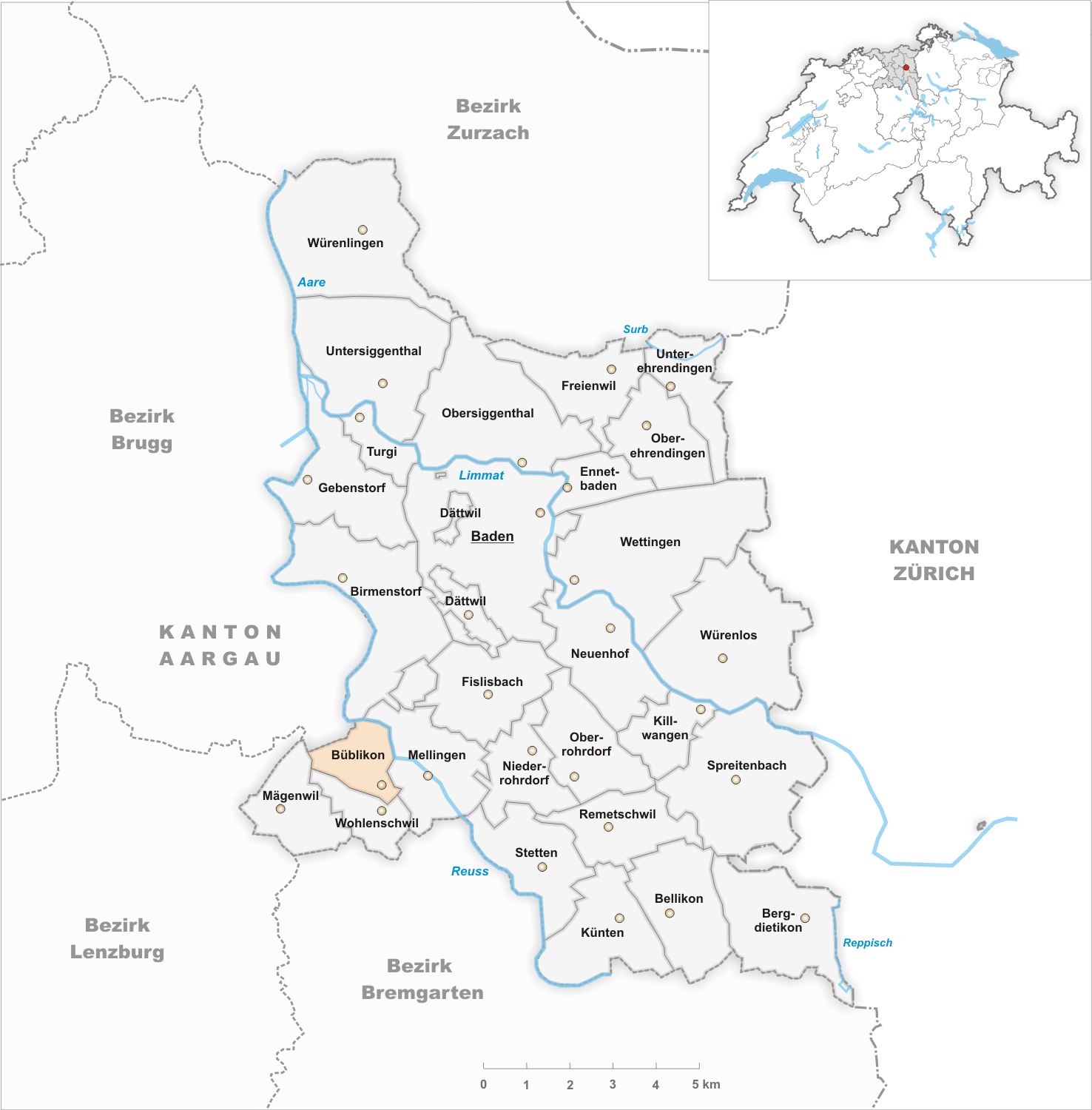 Municipality Büblikon